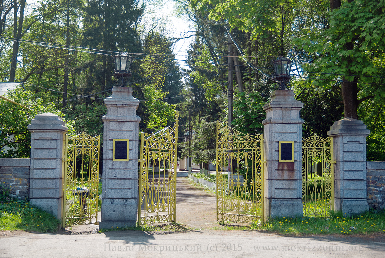 Новочорторийський, Любарський р-н, с. Нова Чортория